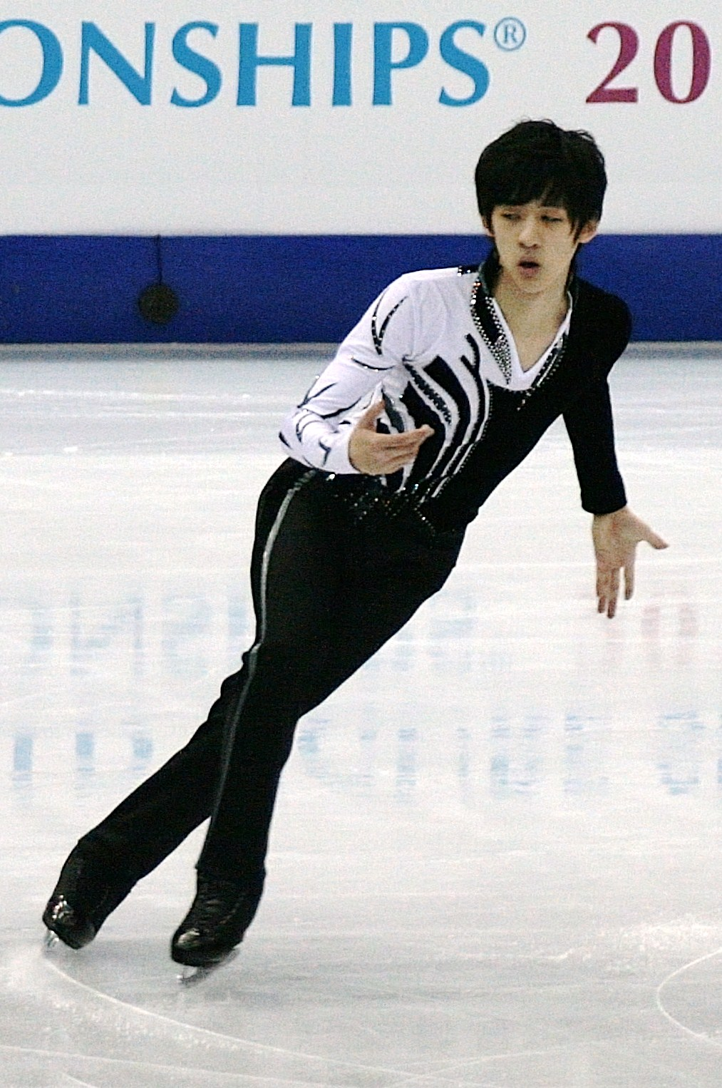 Джордан Джу (Тайвань) на чемпионате мира по фигурному катанию 2012